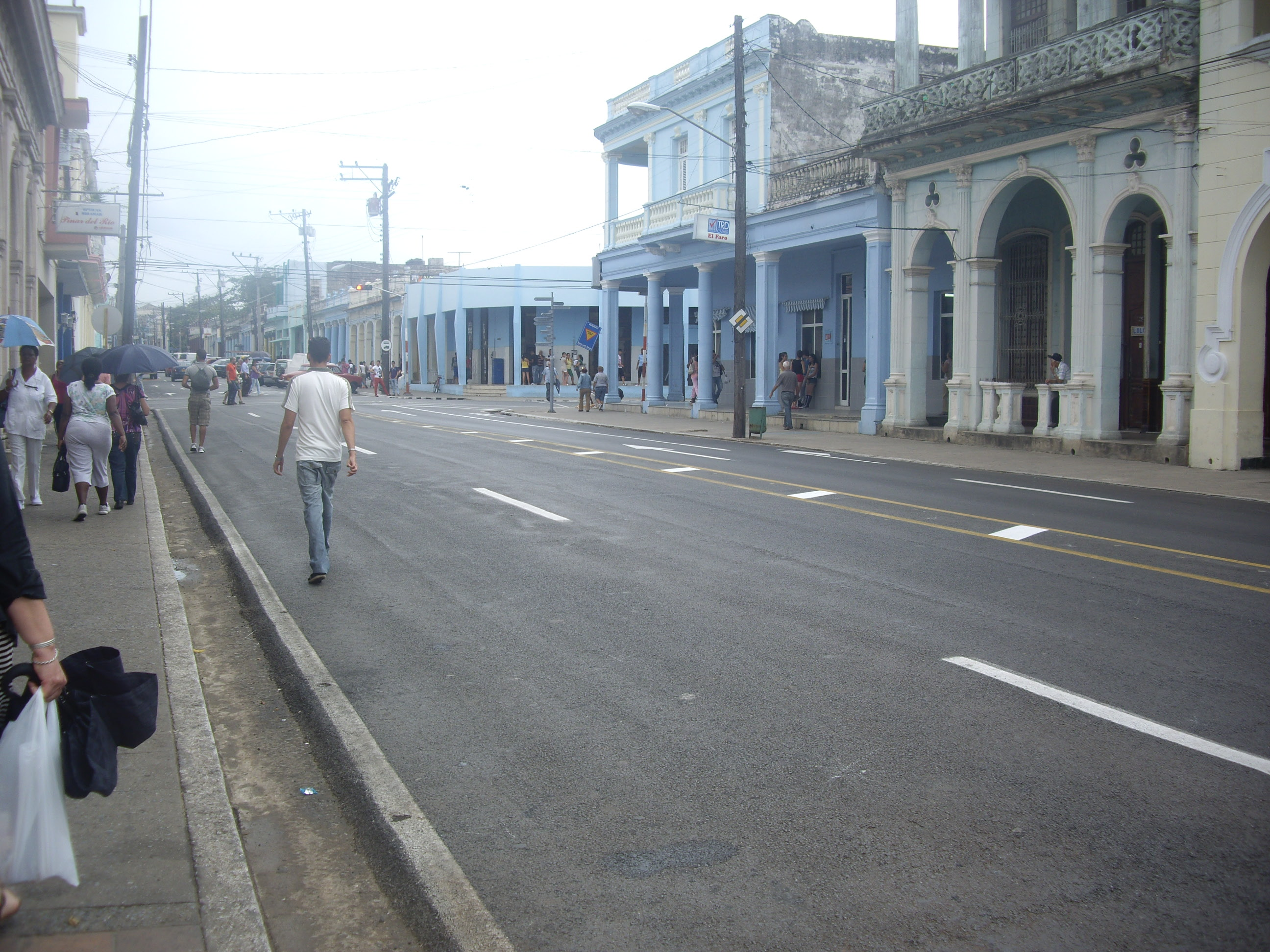 Carrer José Martí a Pinar del Rio